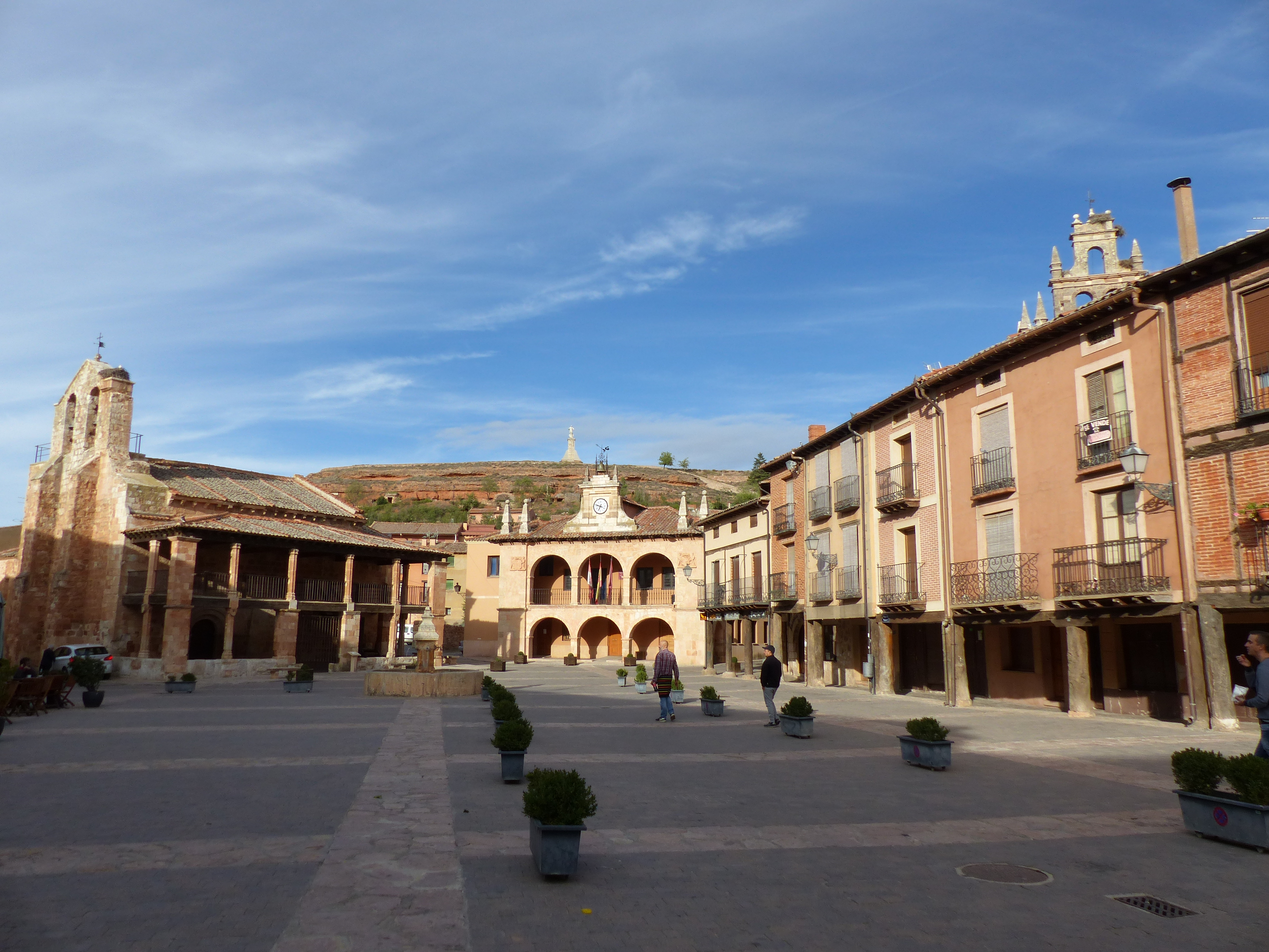 Ayllón, Segovia, España